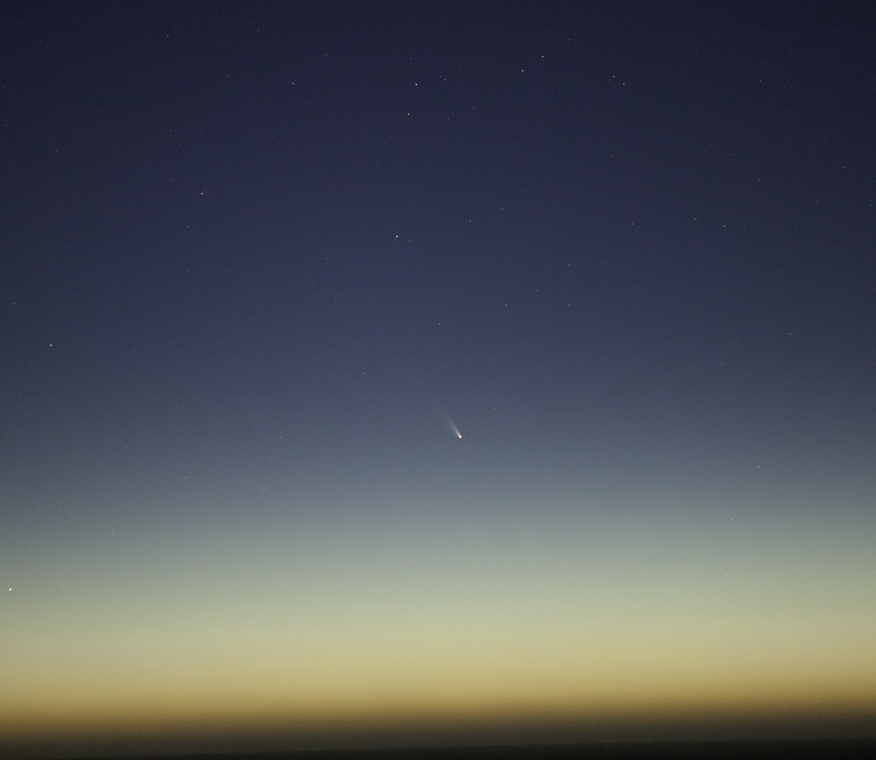 Comet C/2011 L4 (Pan-STARRS)